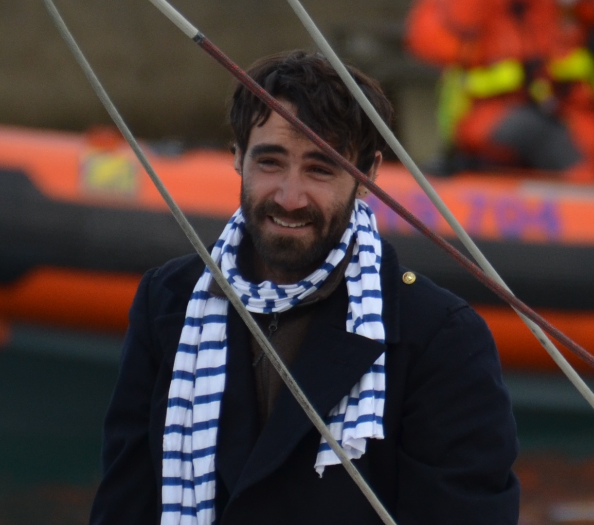 Alan Roura au départ du Vendée Globe 2016-2017